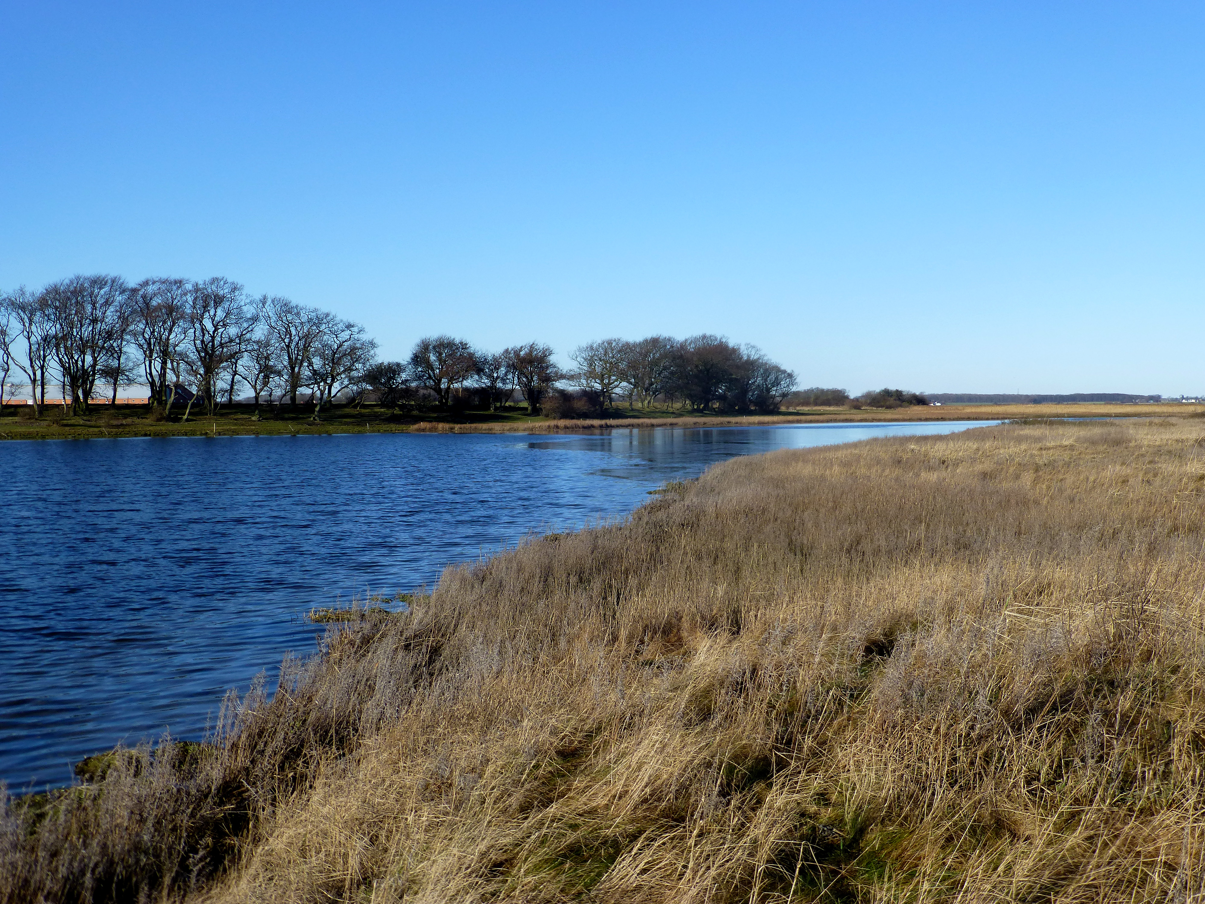 Horskær set mod nord